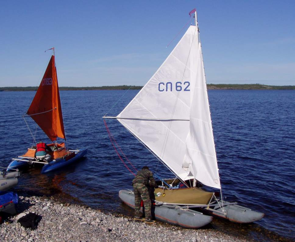 Перед стартом гонки с о-ва Селькамарьянсари.